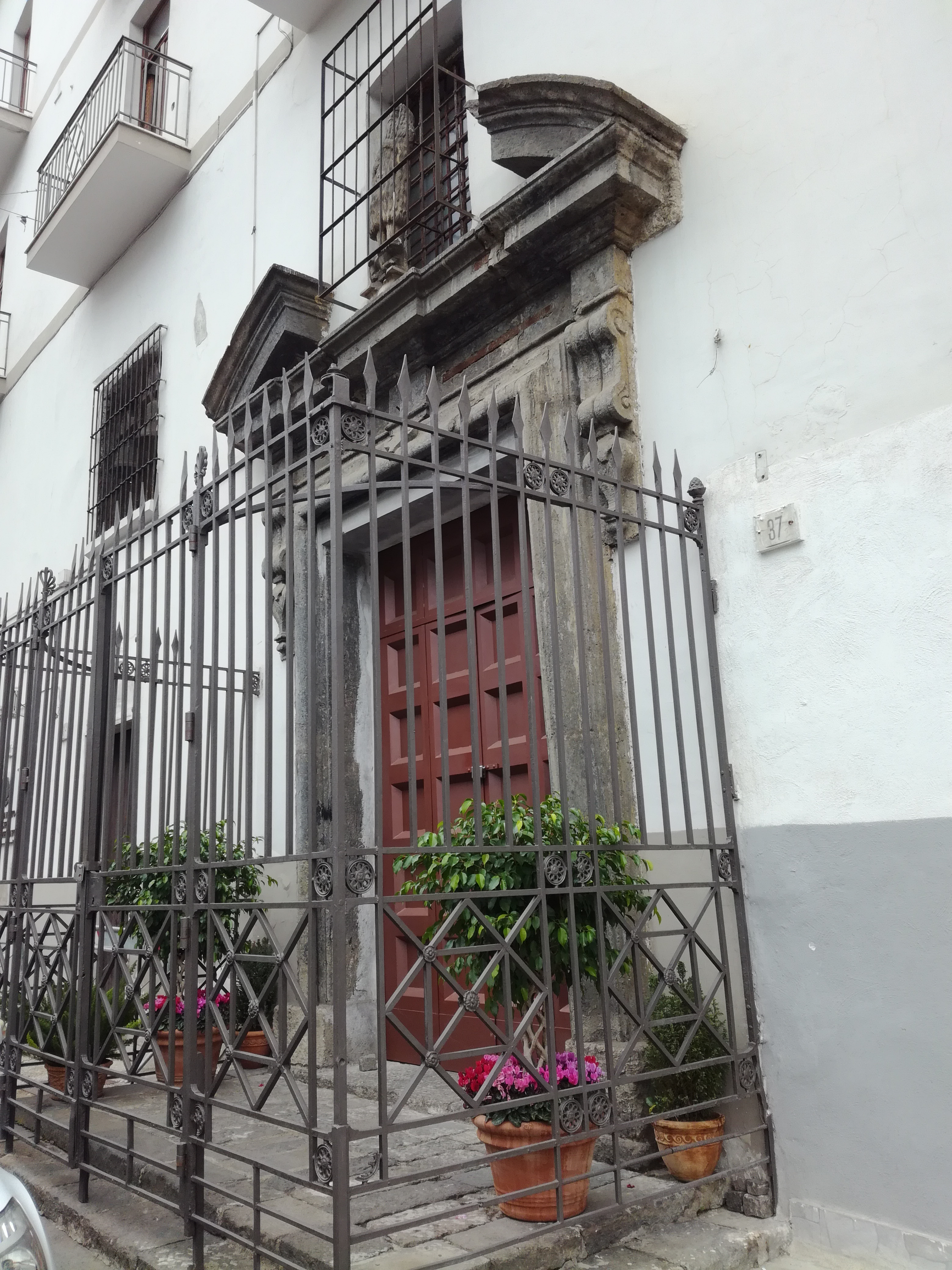 Facciata Onofrio Vicaria